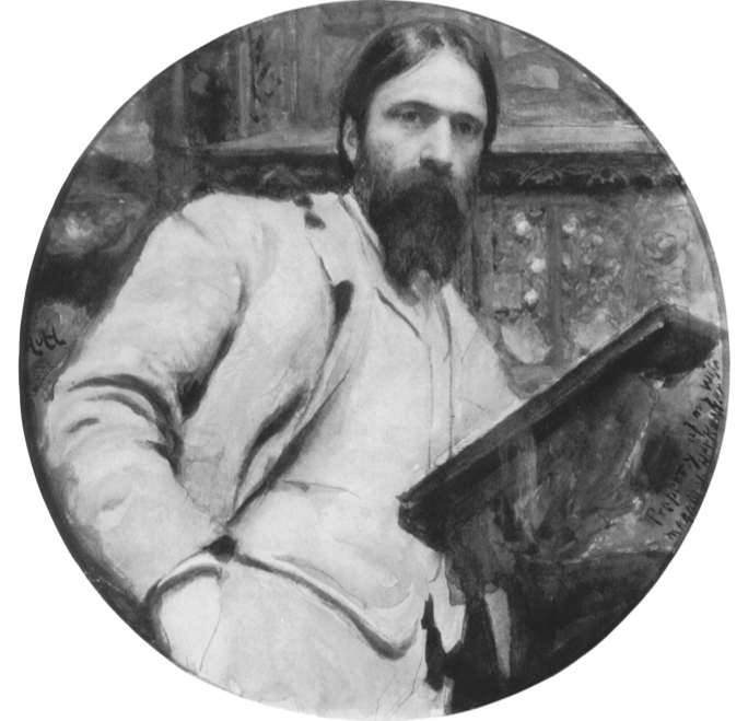 Self-portrait